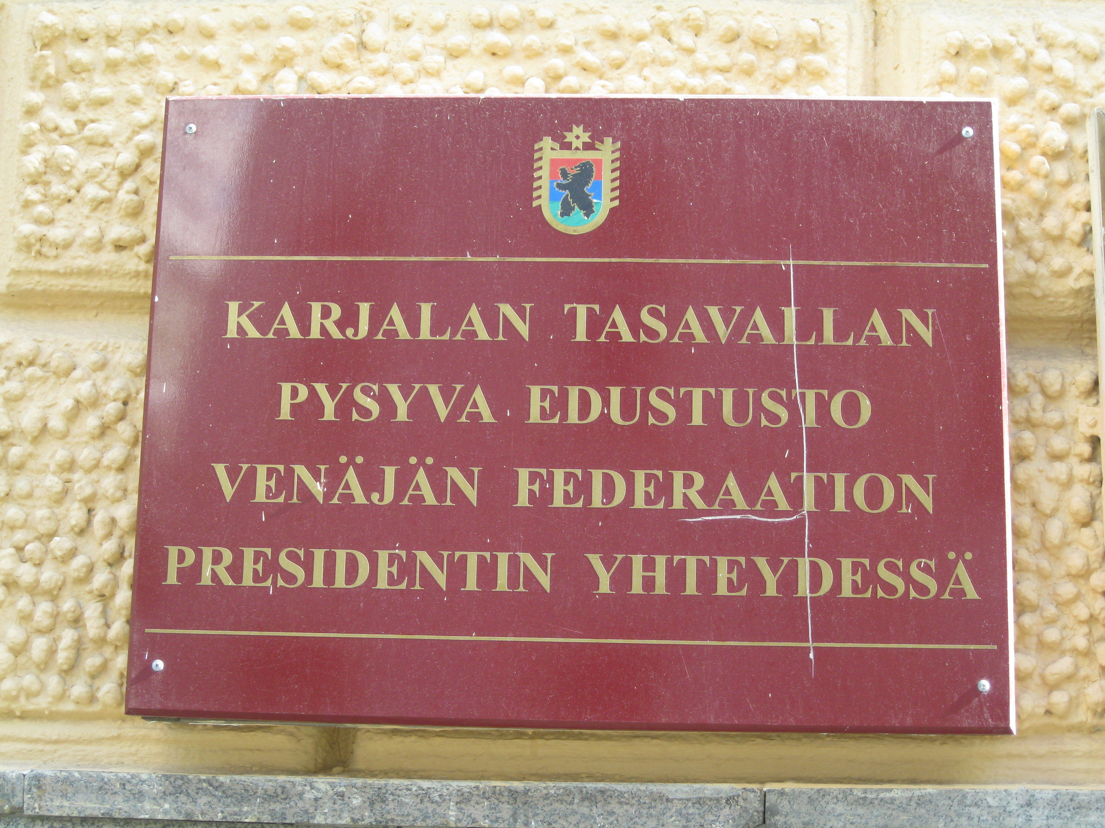 Табличка Постоянного представительства Республики Карелия при Президенте Российской Федерации в Москве